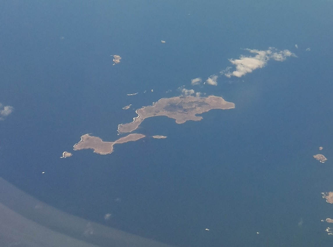 Islas Tova y Tovita, Chubut